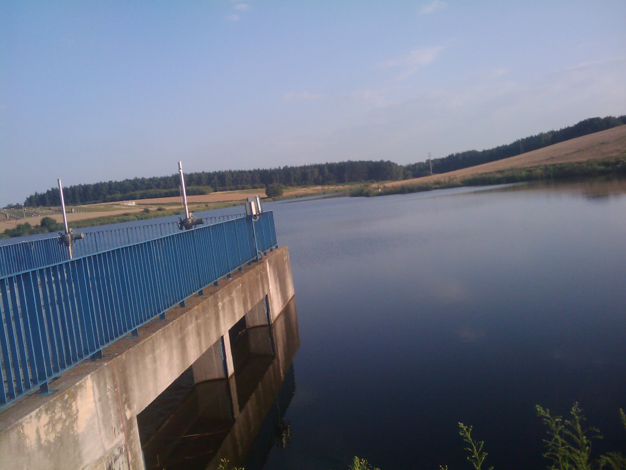 Widok na zalew w miejscowości Radzyny w kierunku Kaźmierza